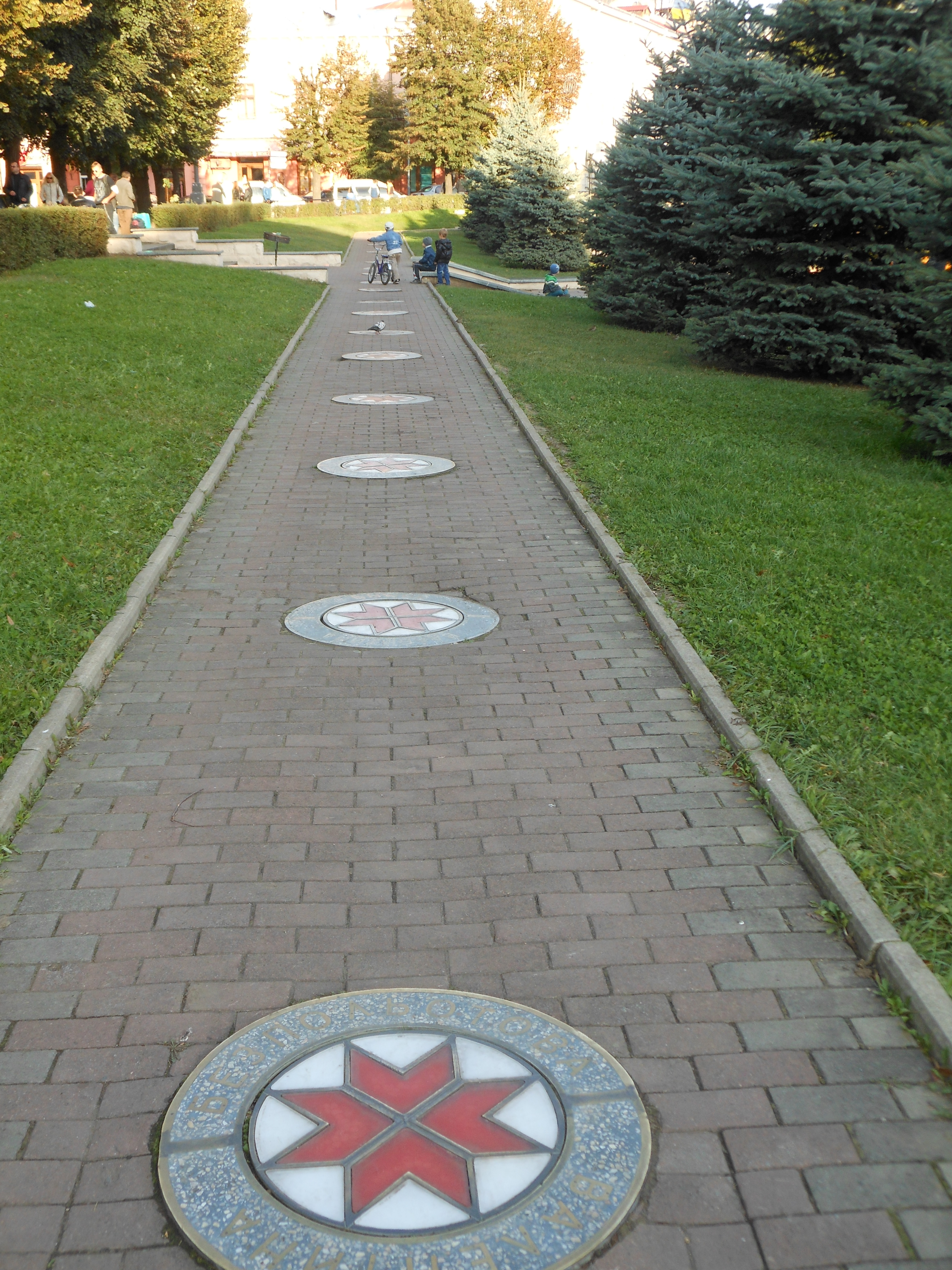 Алея зірок, Чернівці, пл. Театральна вересень 2014